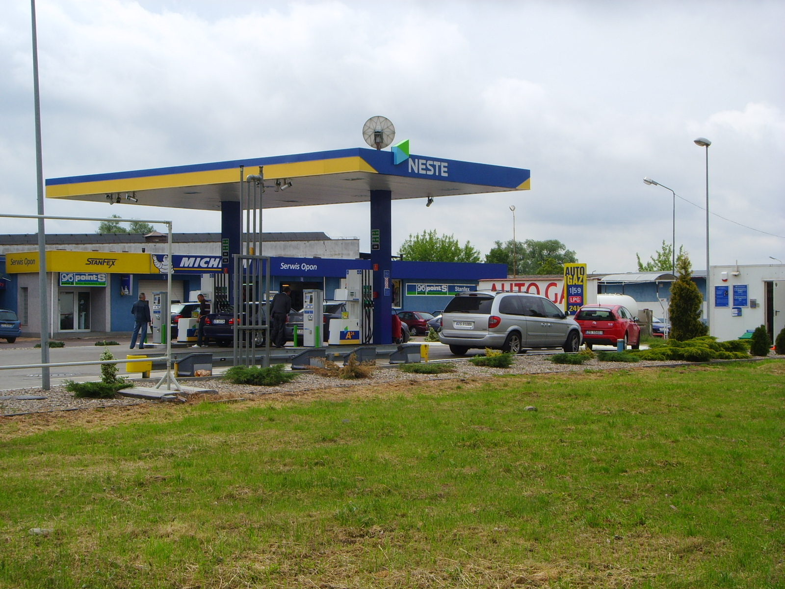 W tym miejscu była strażnica WOP "Czajki" w Szczecinie (ul. Gdańska)